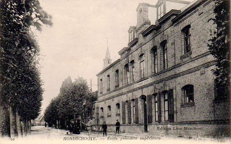 École Primaire supérieure d'Hondschoote (Nord), carte postale ancienne (non grevée de droits).